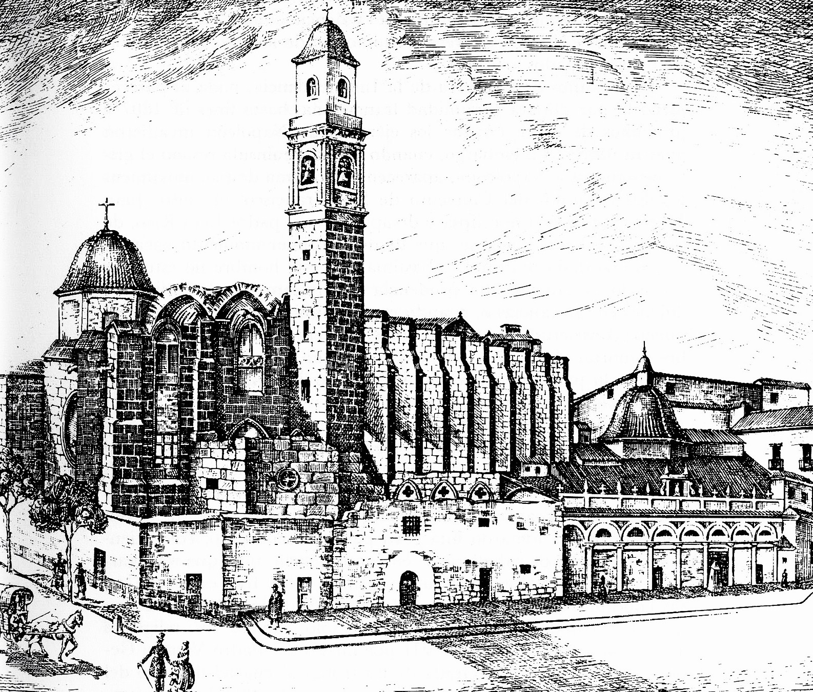 Convent de sant Francesc de València, ca. 1840.